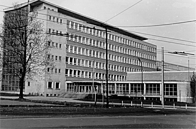 Einweihung der Schule 1956